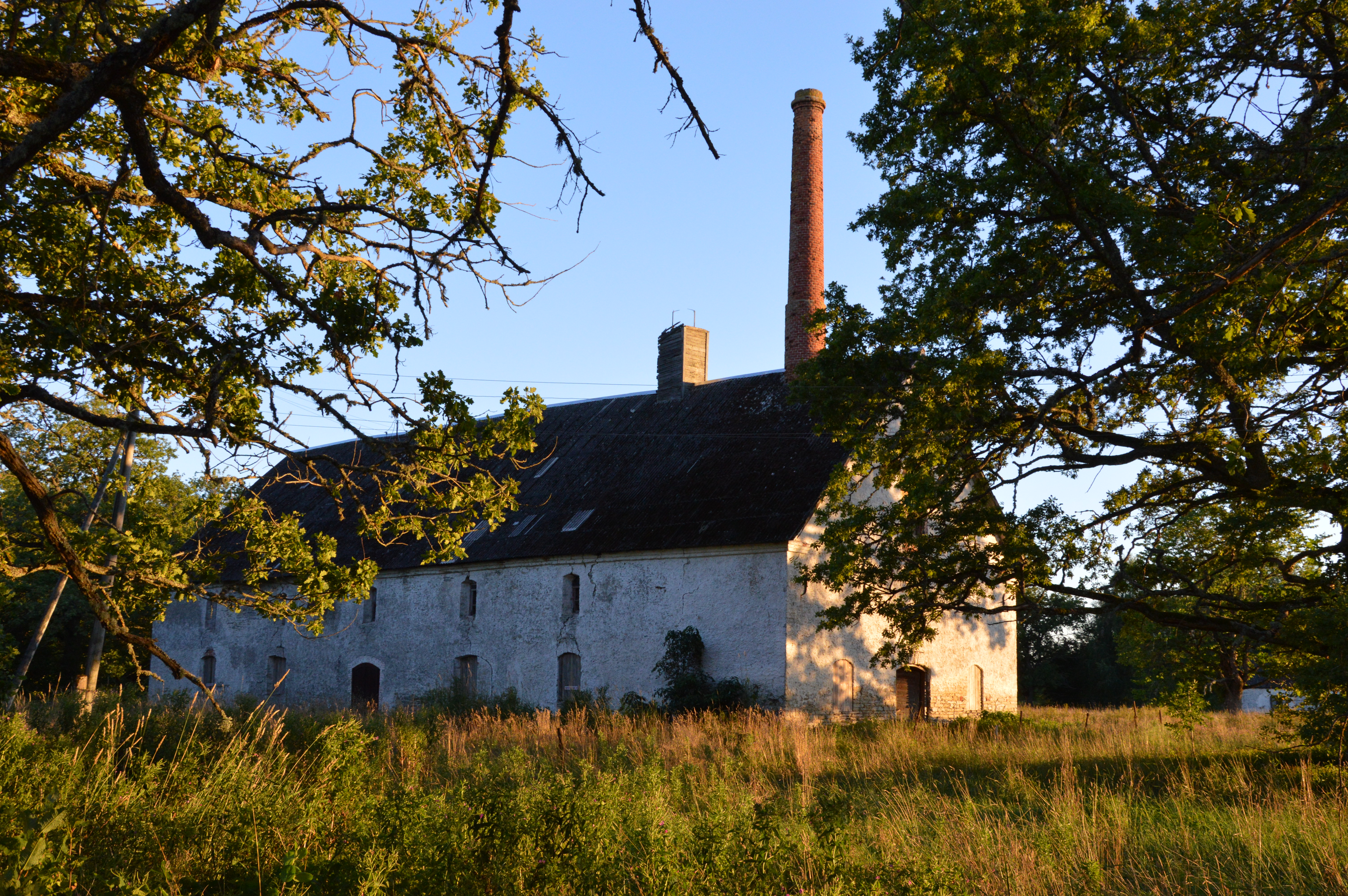 Vana-Vigala mõisa viinavabrik